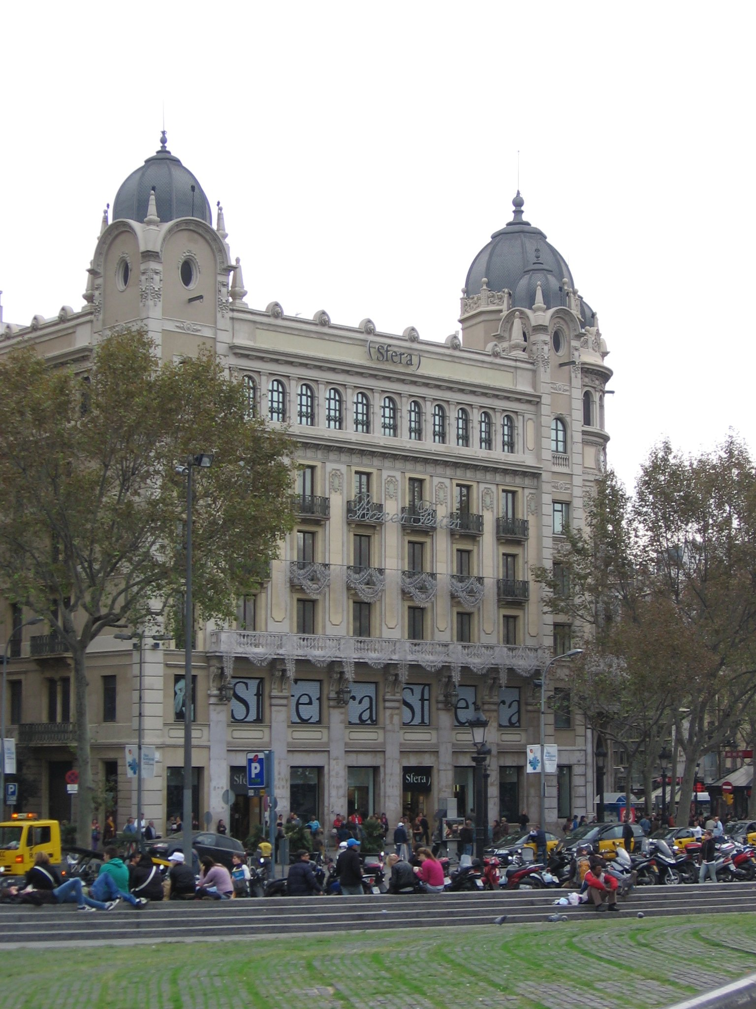 Banca Arnús, de Enric Sagnier i Villavecchia (Barcelona). Posteriorment Banco Central Hispanoamericano, en el 2008 centre comercial de la marca Sfera, i actualment de El Corte Ingles